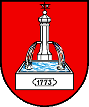 Wappen von Mitlödi Kanton Glarus Schweiz